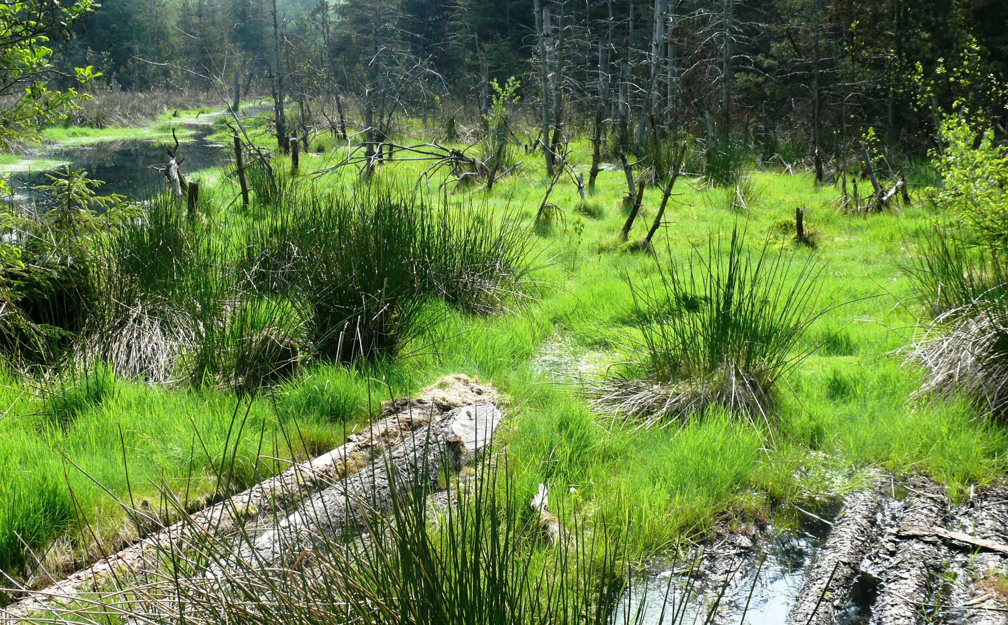 (NSG:BY-NSG-00115.01)_Häuselloh Blick ins Häuselloh Moor bei Selb im Fichtelgebirge, Oberfranken